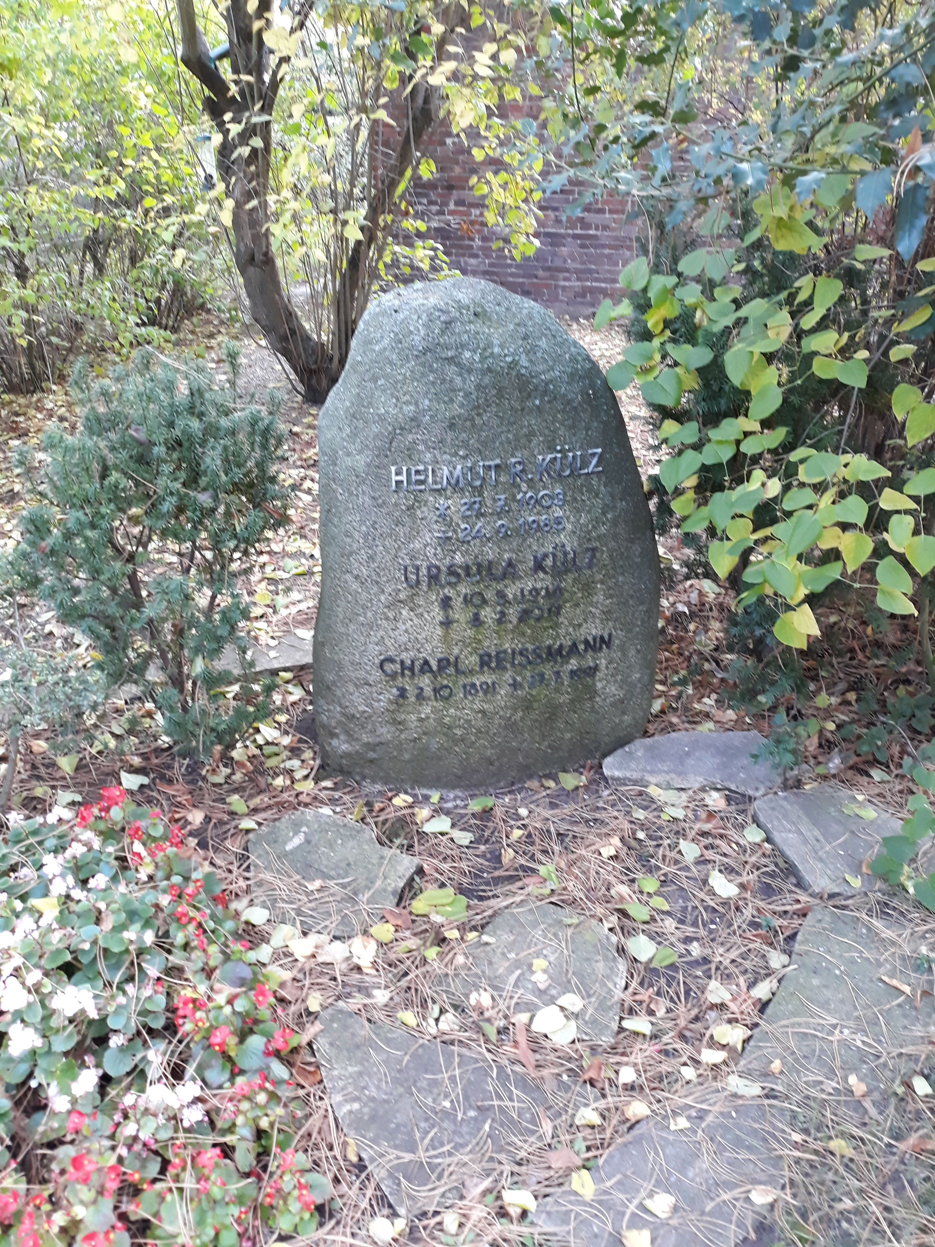 Das Familiengrab des deutschen Juristen Helmut R. Külz auf dem Friedhof Wilmersdorf in Berlin.